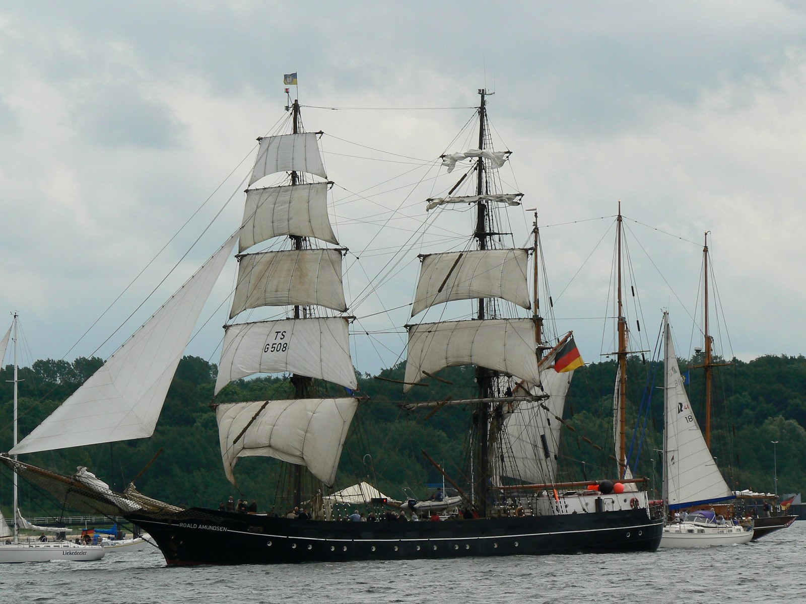 Segelschiff (Brigg) Roald Amundsen auf der Kieler Woche 2007.